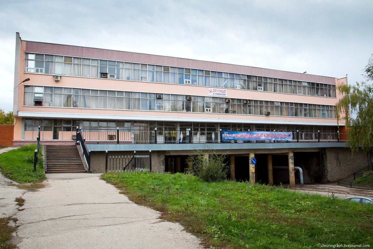 Управление СНТК им. Кузнецова. Посёлок Управленческий, Красноглинский район Самары, Россия.